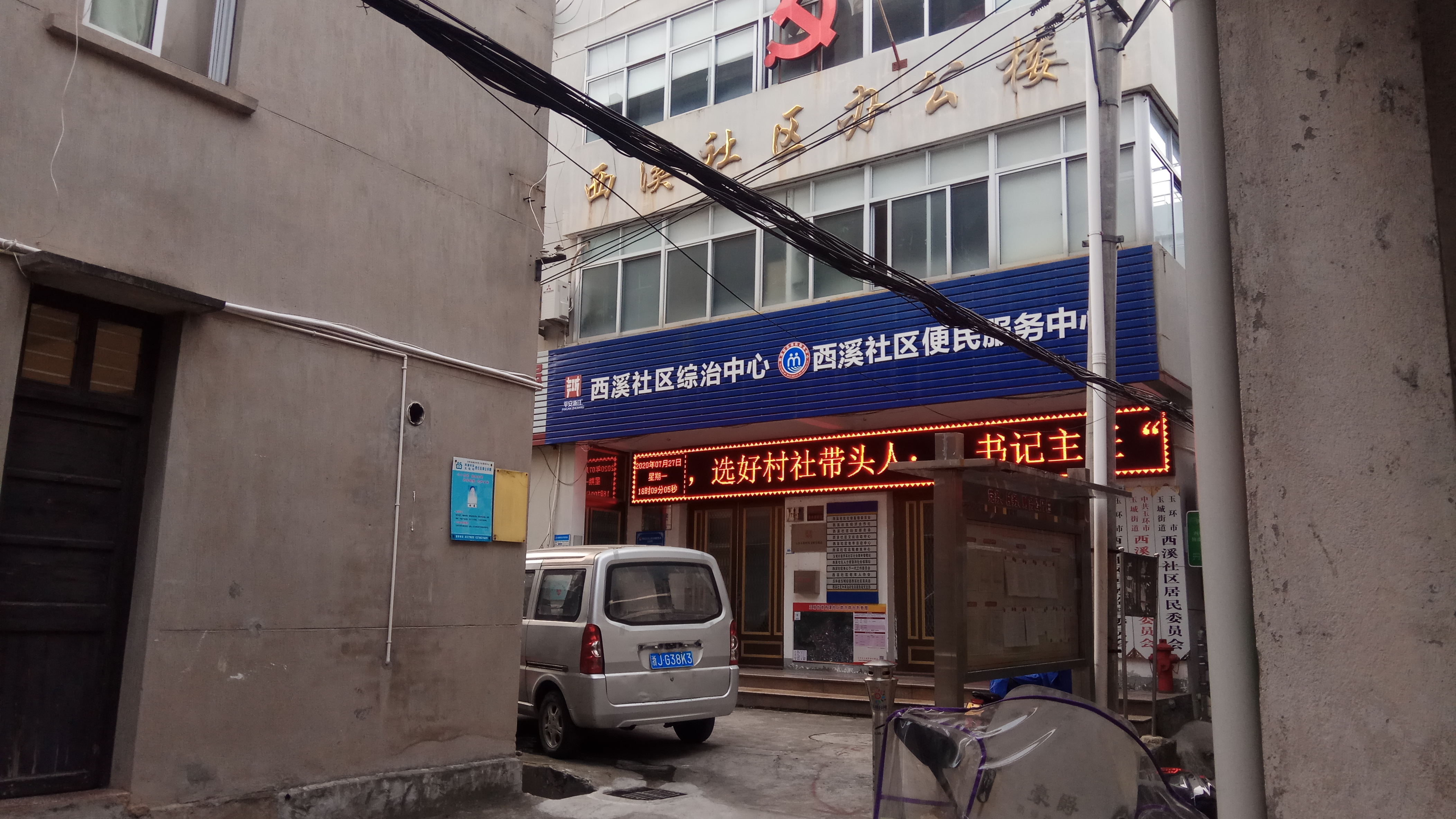 中文（中国大陆）: 浙江省玉环市西溪社区